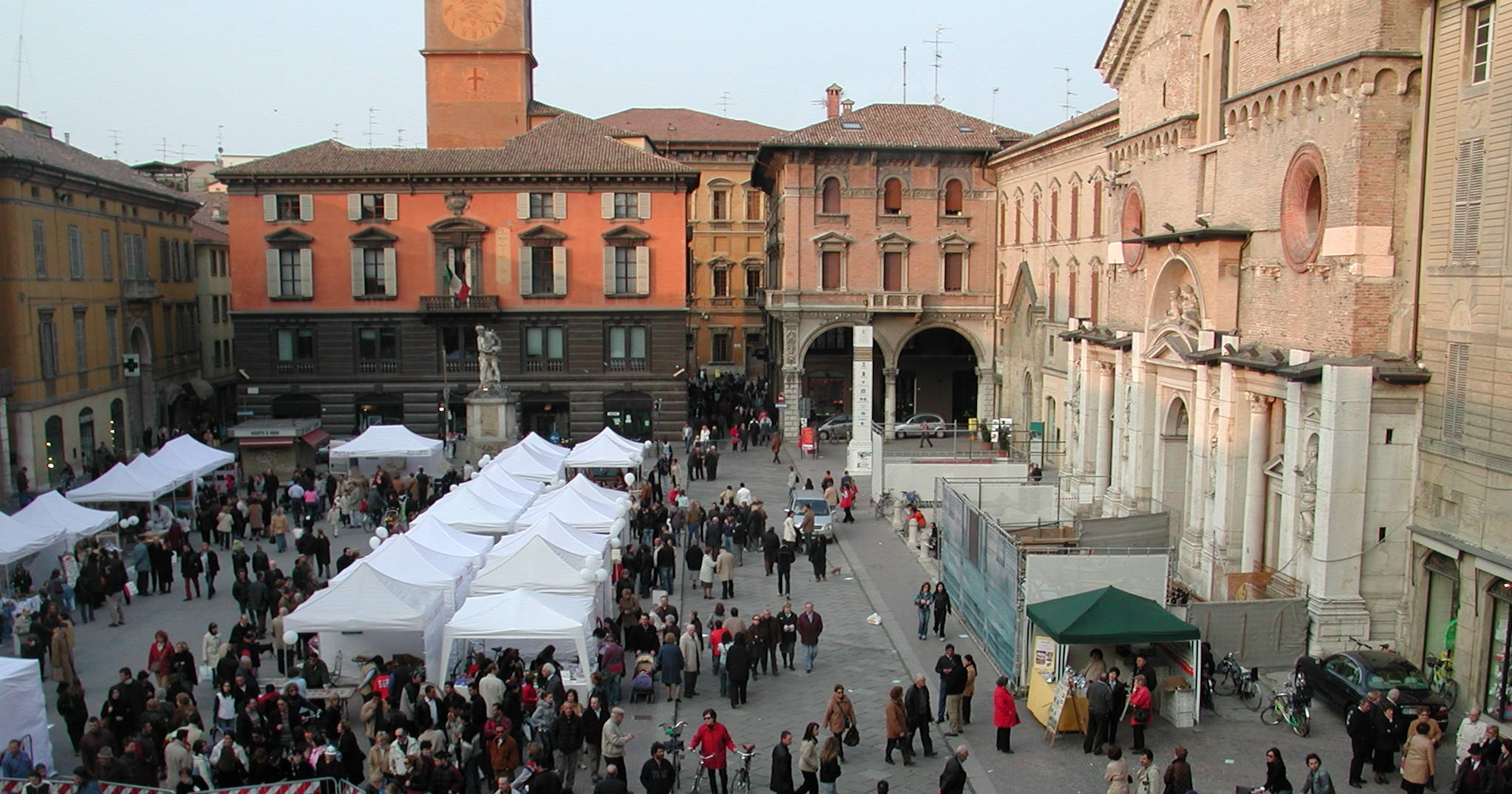 Reggio Emilia, Italy, Piazza del duomo